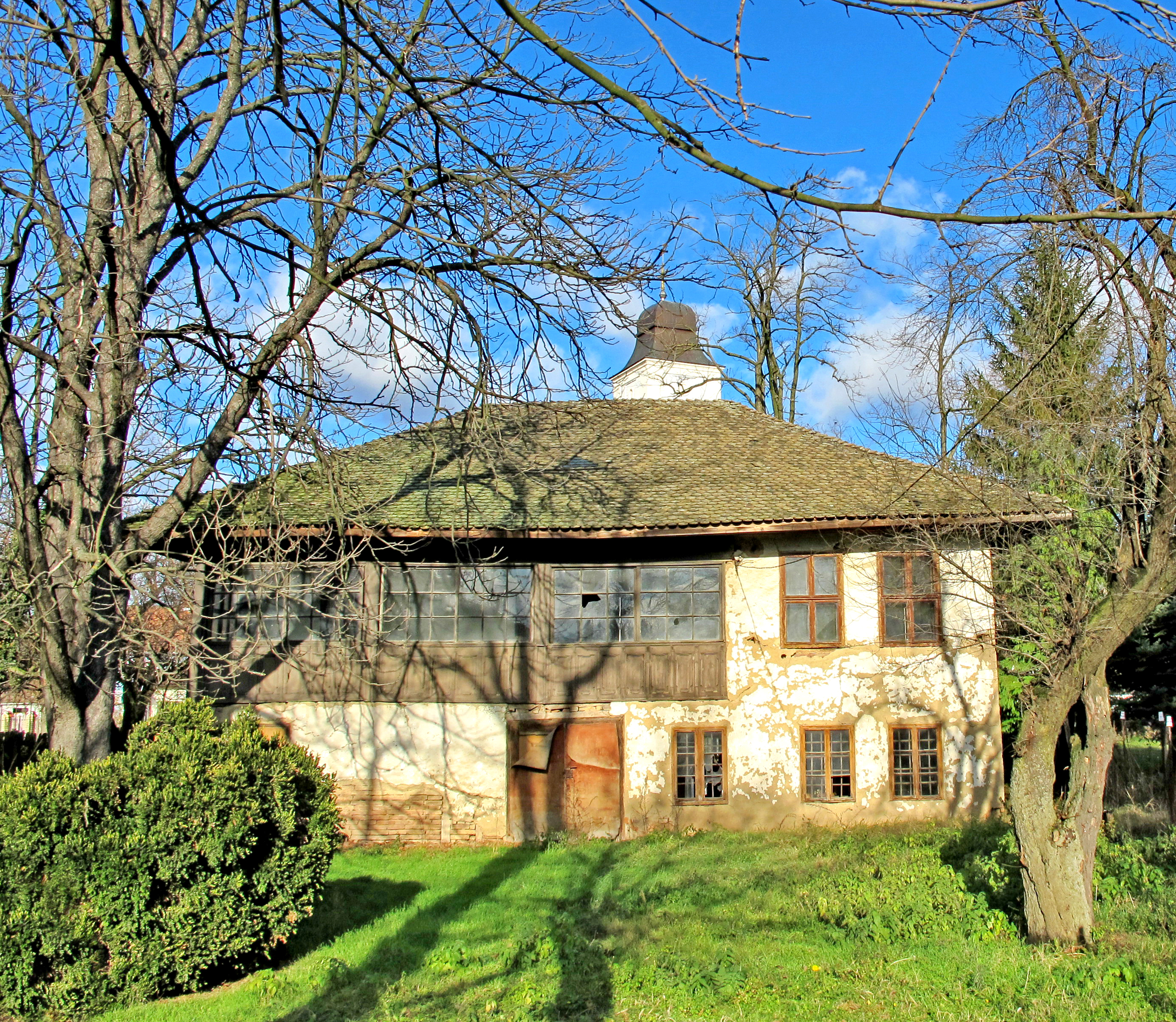 Kuća Popovića, Kolari